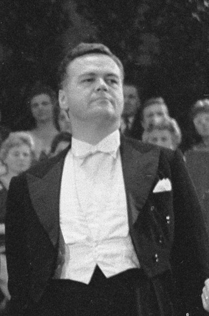 Uitreiking Edisons in Grand Gala Du Disque . De winnaars van de Edisons: Casadesus, Schwarzkopf, Haitink, mejuffrouw Schil (namens het Amadeus Quartet), Jack Boyce en Thurston Dart (voor Sutherland) en uiterst rechts staatsecretaris Scholte